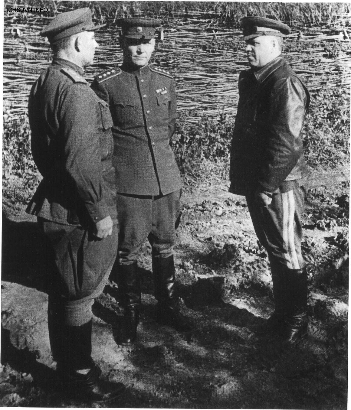 Battaglia di Kursk-Char'kov, estate 1943: al centro il generale Konev, a destra il maresciallo Zukov